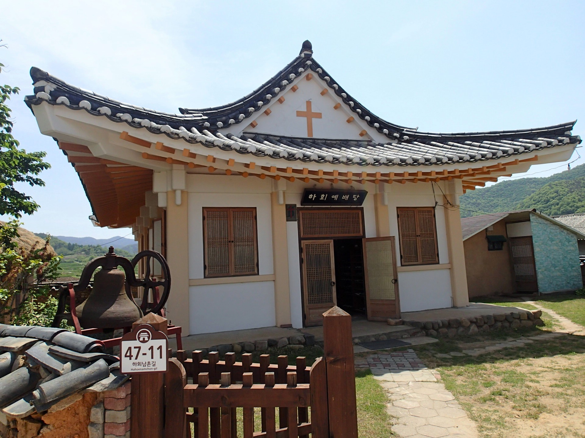 Church, Hahoe Folk Village